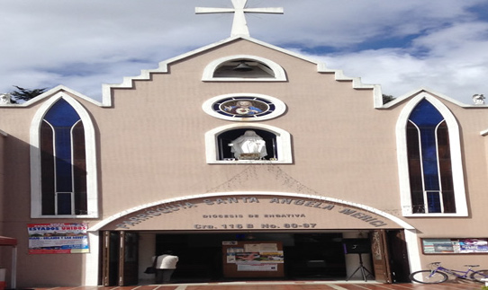 Iglesia Santa Angela Merici